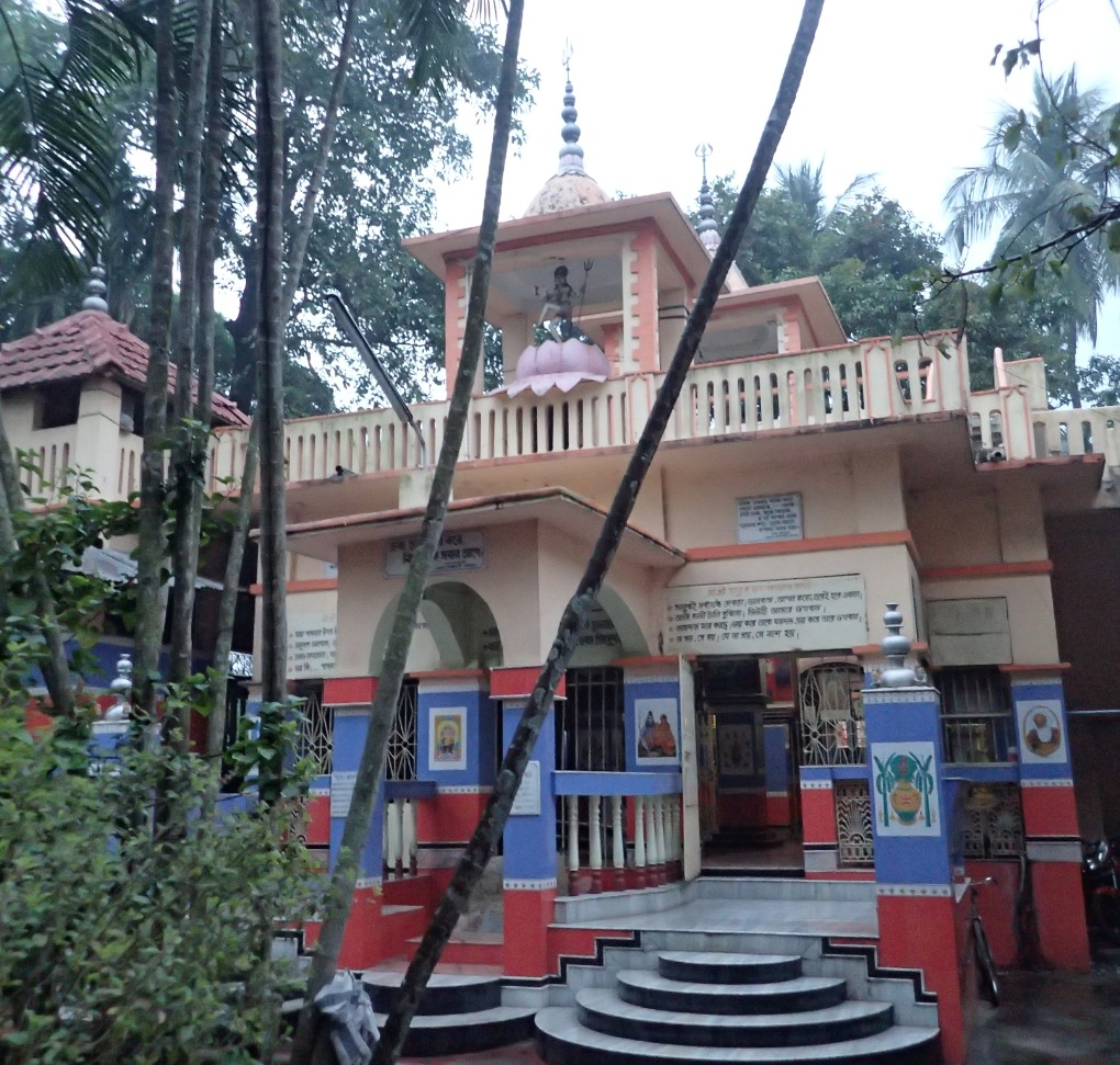 Pagal Baba Ashram inKalna